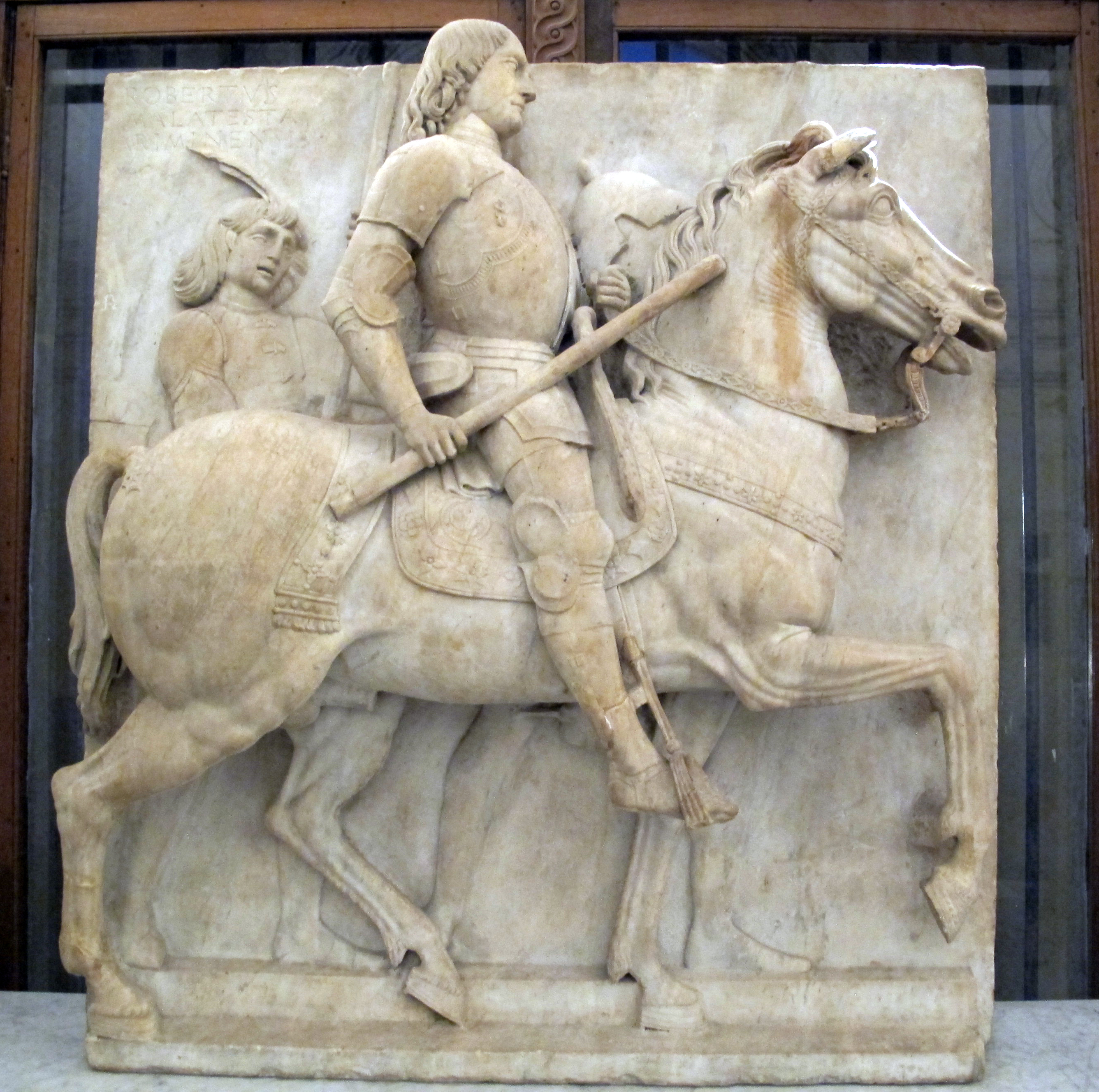 scultura italiana al Louvre